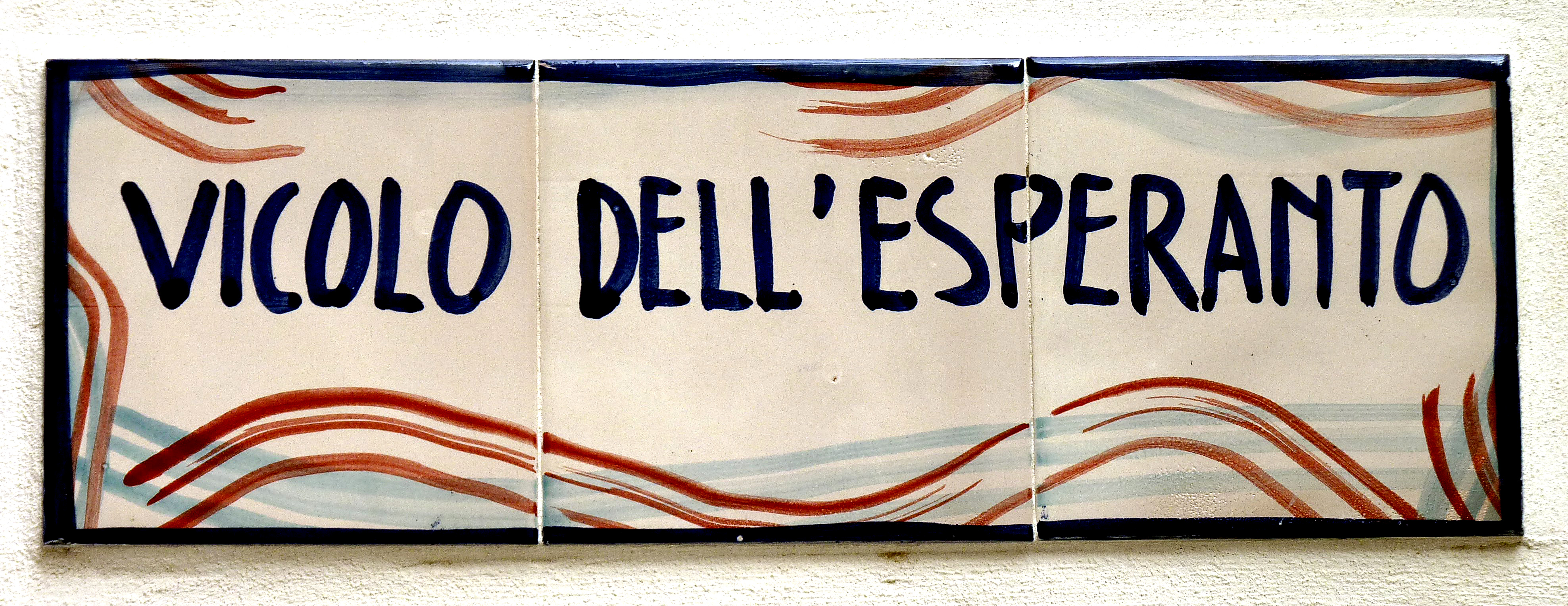 Glazura ŝildo kun stratnomo en Mazara del Vallo, Sicilio, Italio.